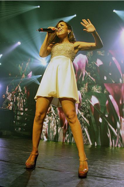 Wanessa durante show em 2008.